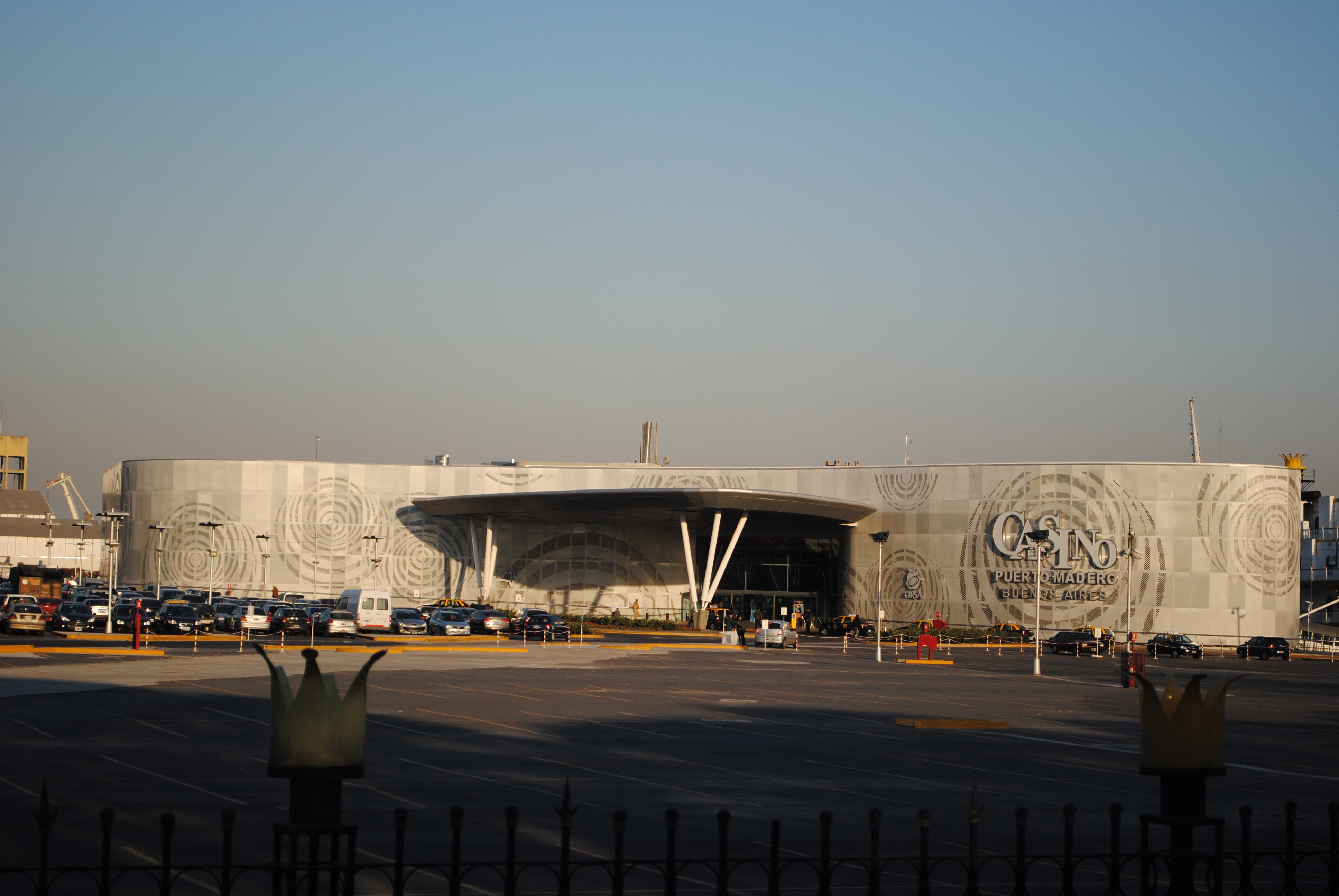 The Puerto Madero Casino, Buenos Aires.